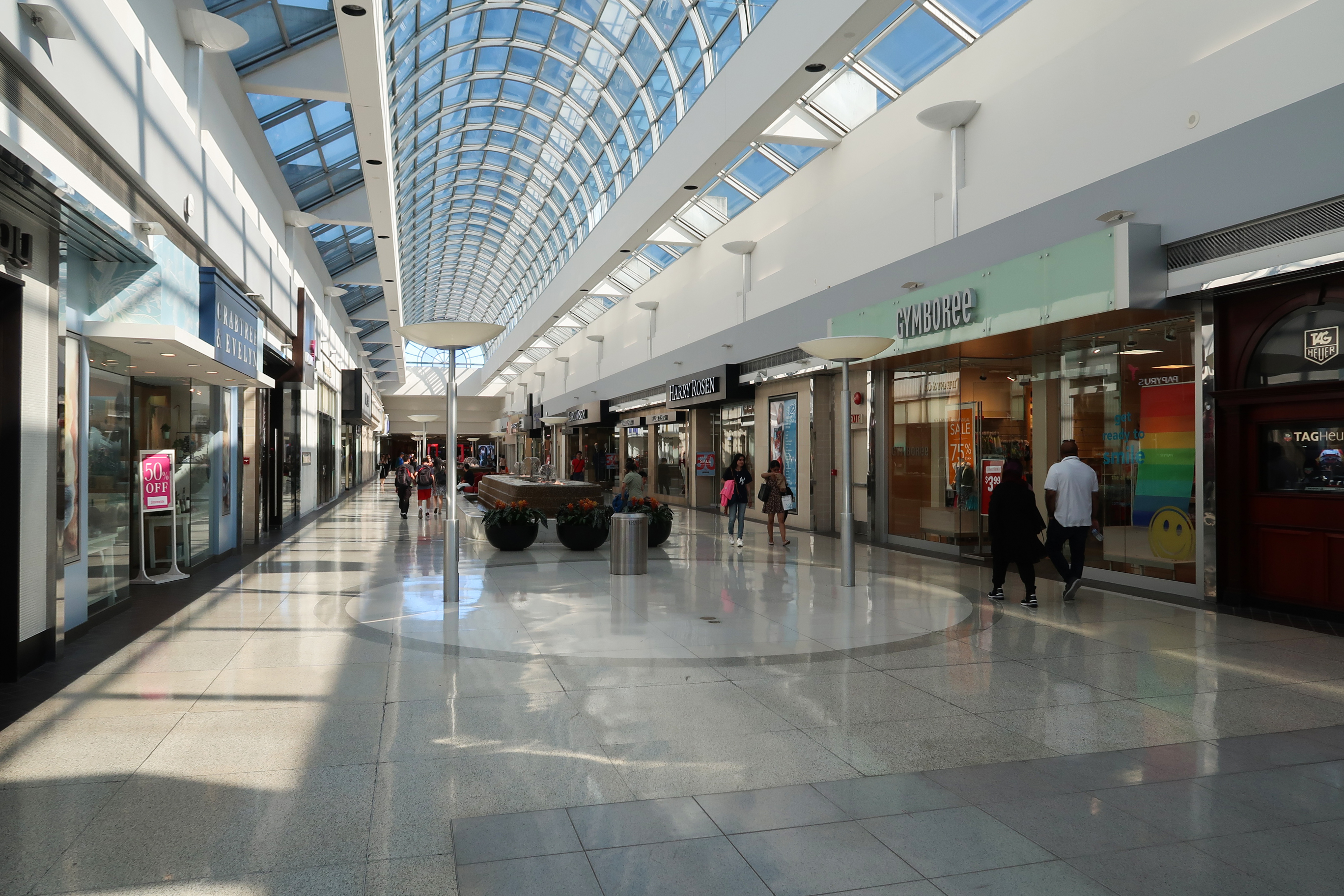 Oakridge Centre Interior